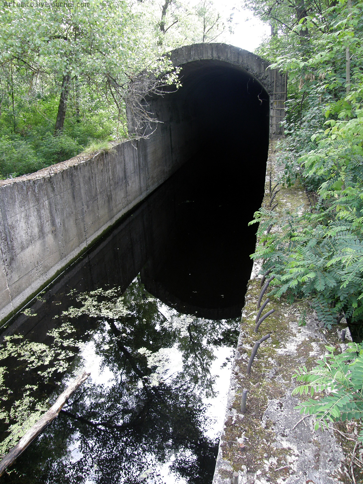 туннель под Днепром на Жуковом острове